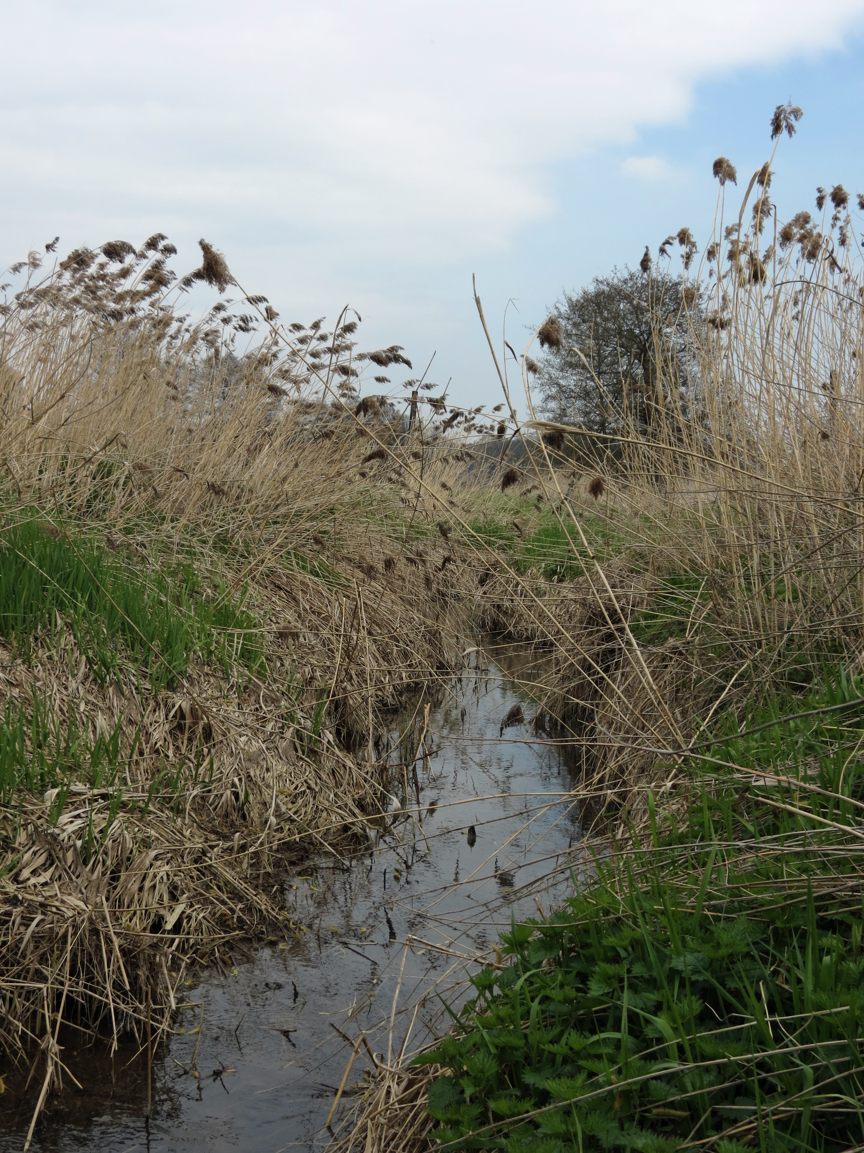 PP Lukavecký potok